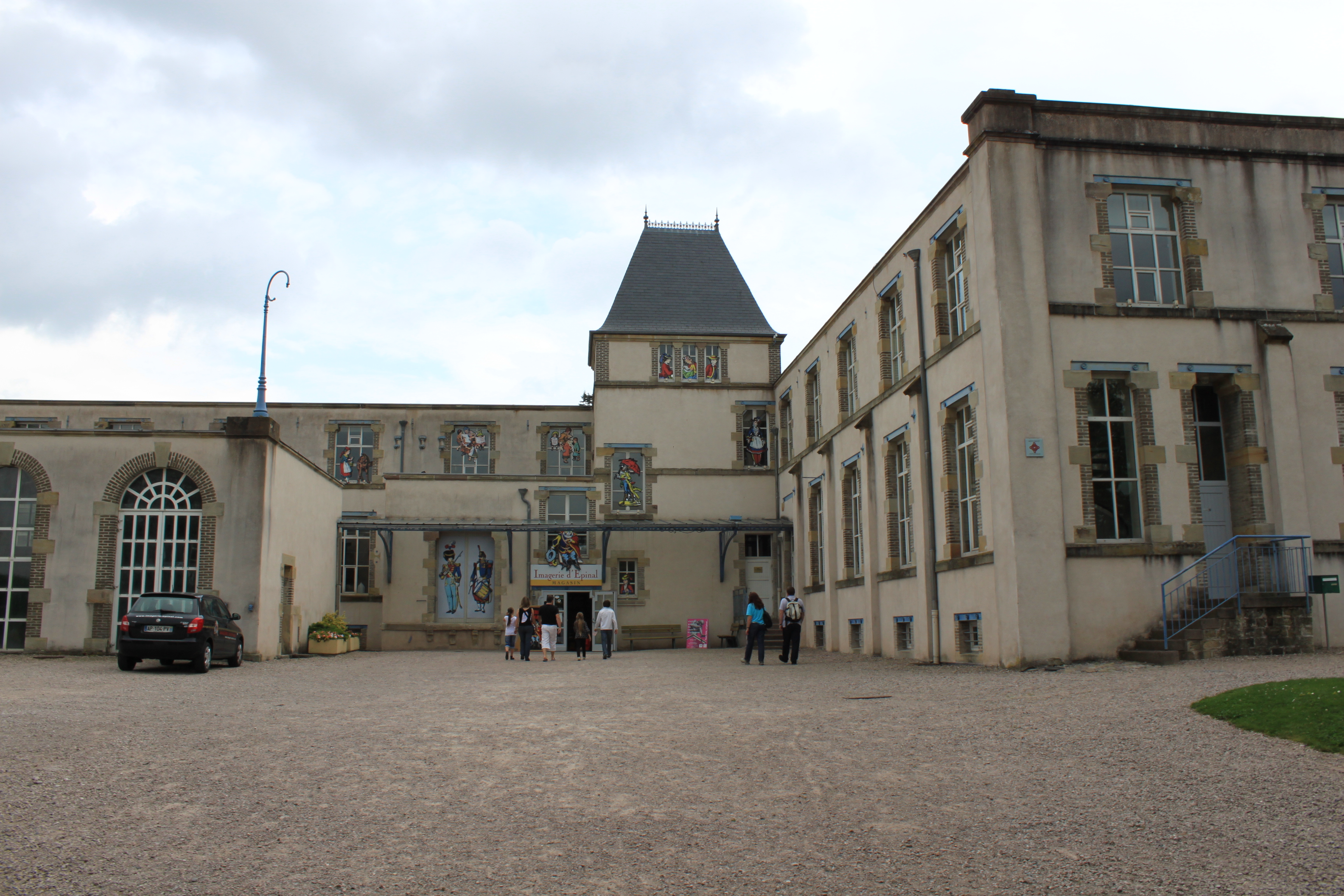 Imagerie d'Épinal, Lorraine, France